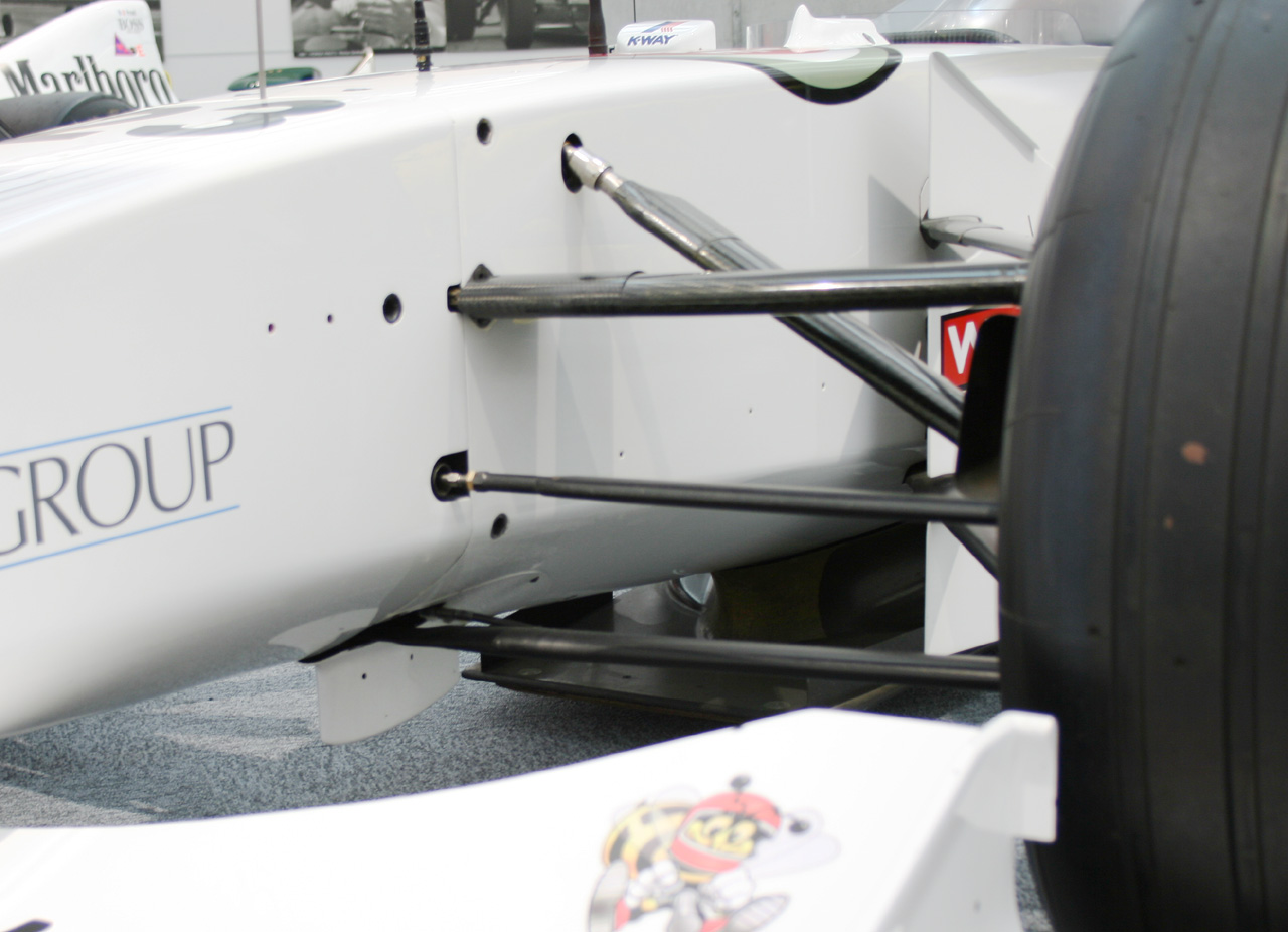 BAR 002 (#23 Ricardo Zonta)